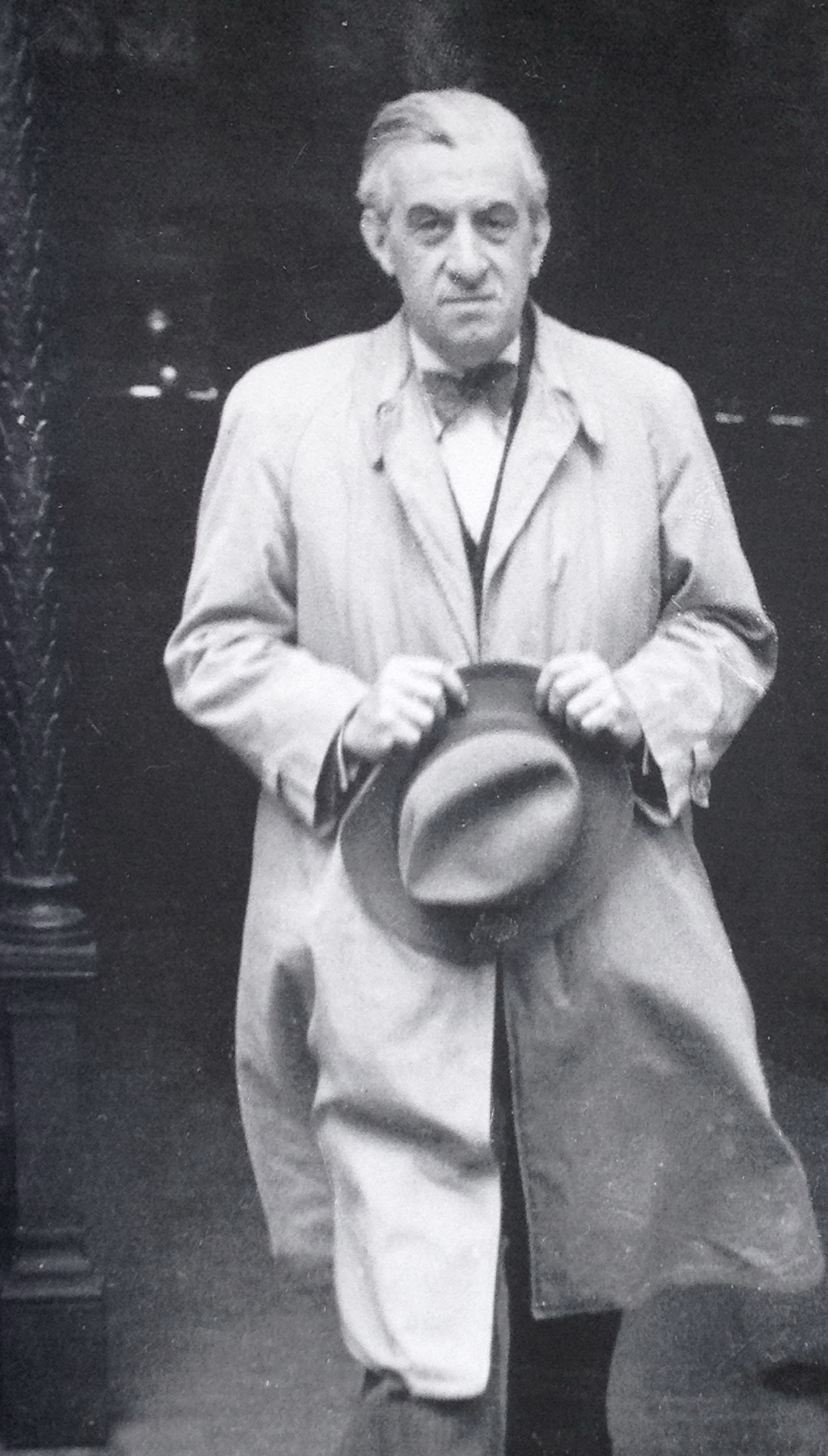 Eugeni Xammar sortint de la cancelleria alemanya a Berlín, l'any 1934